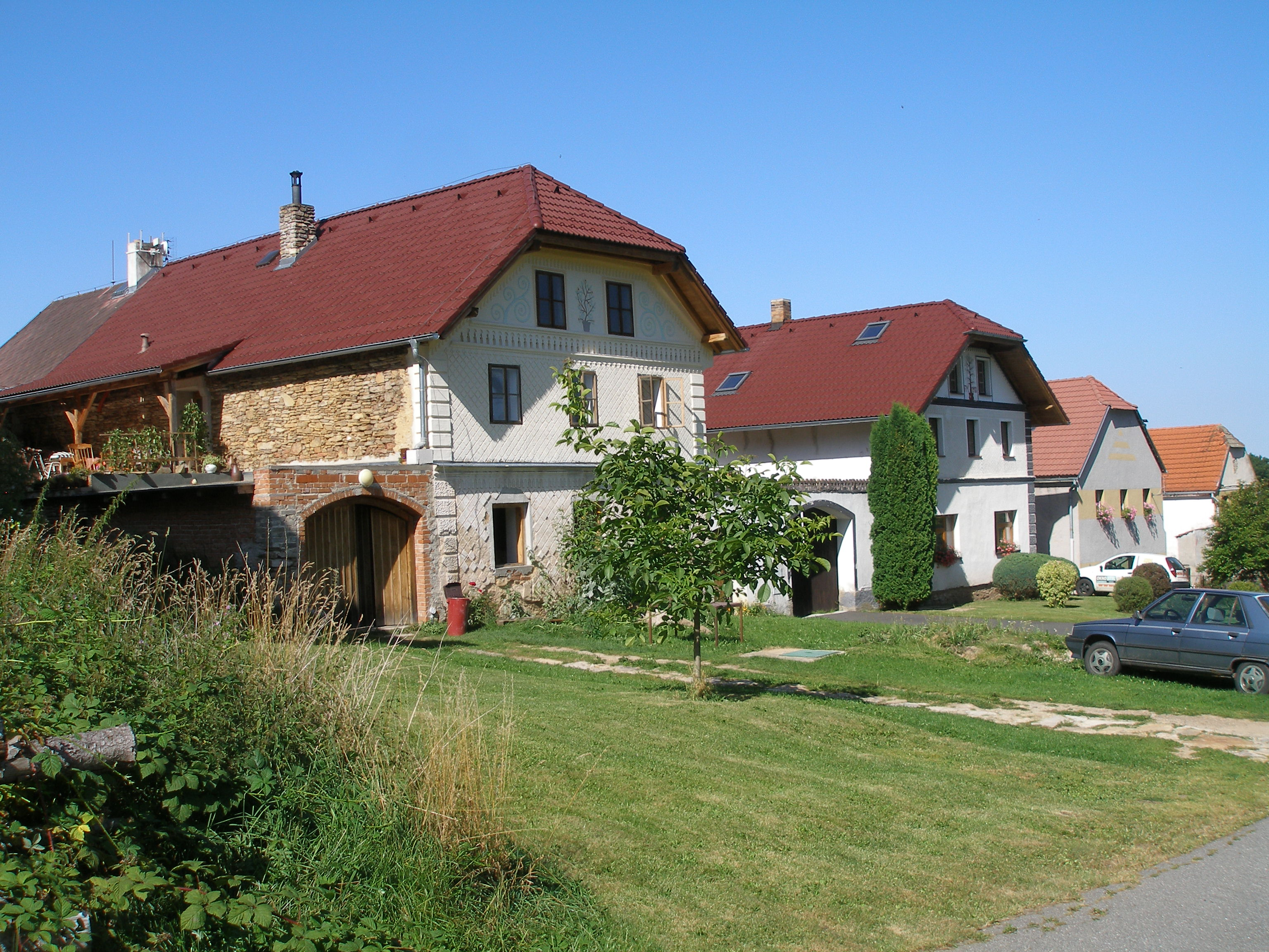 Náves v Klenovicích